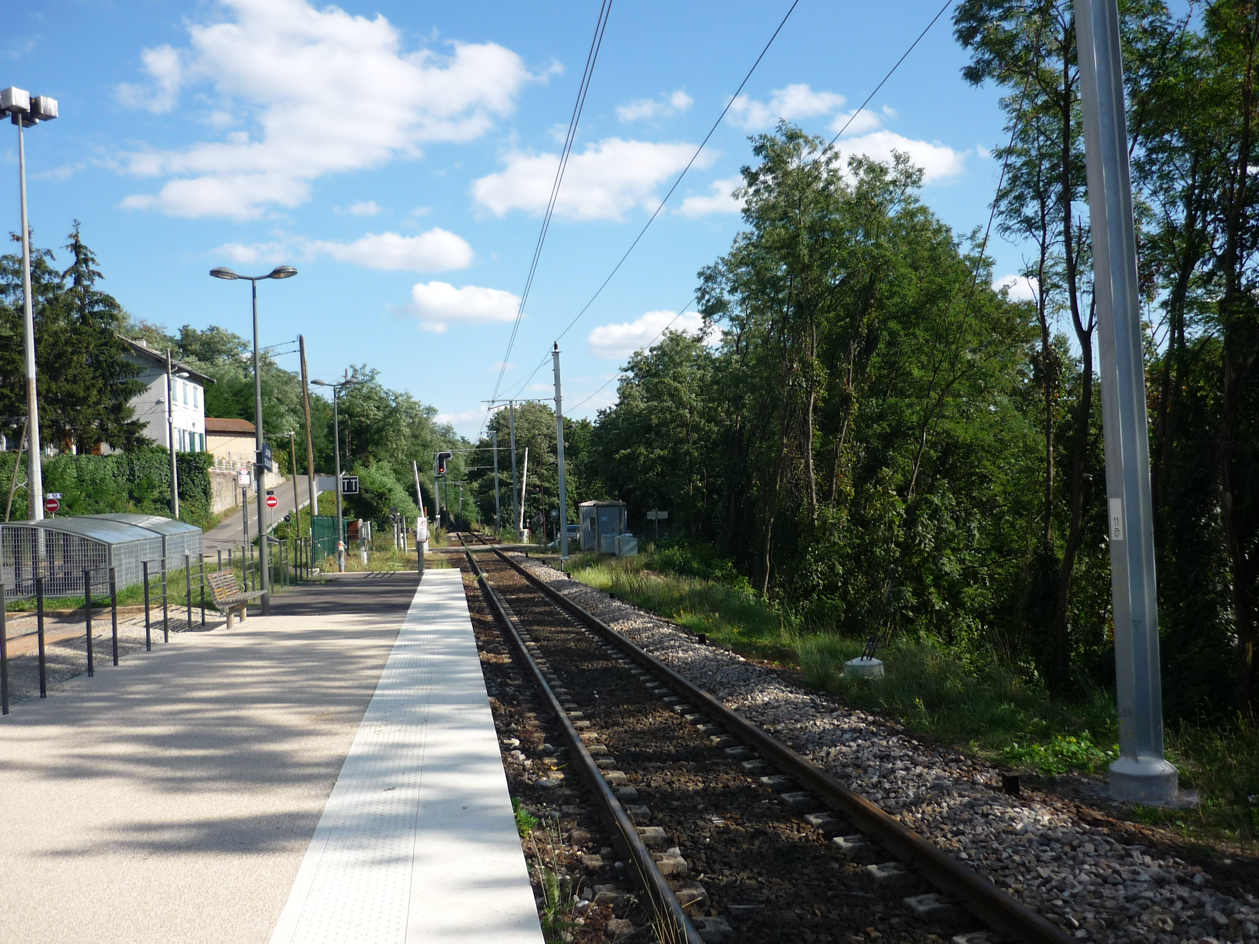 Vue de la gare de La Tour-de-Salvagny direction Lyon